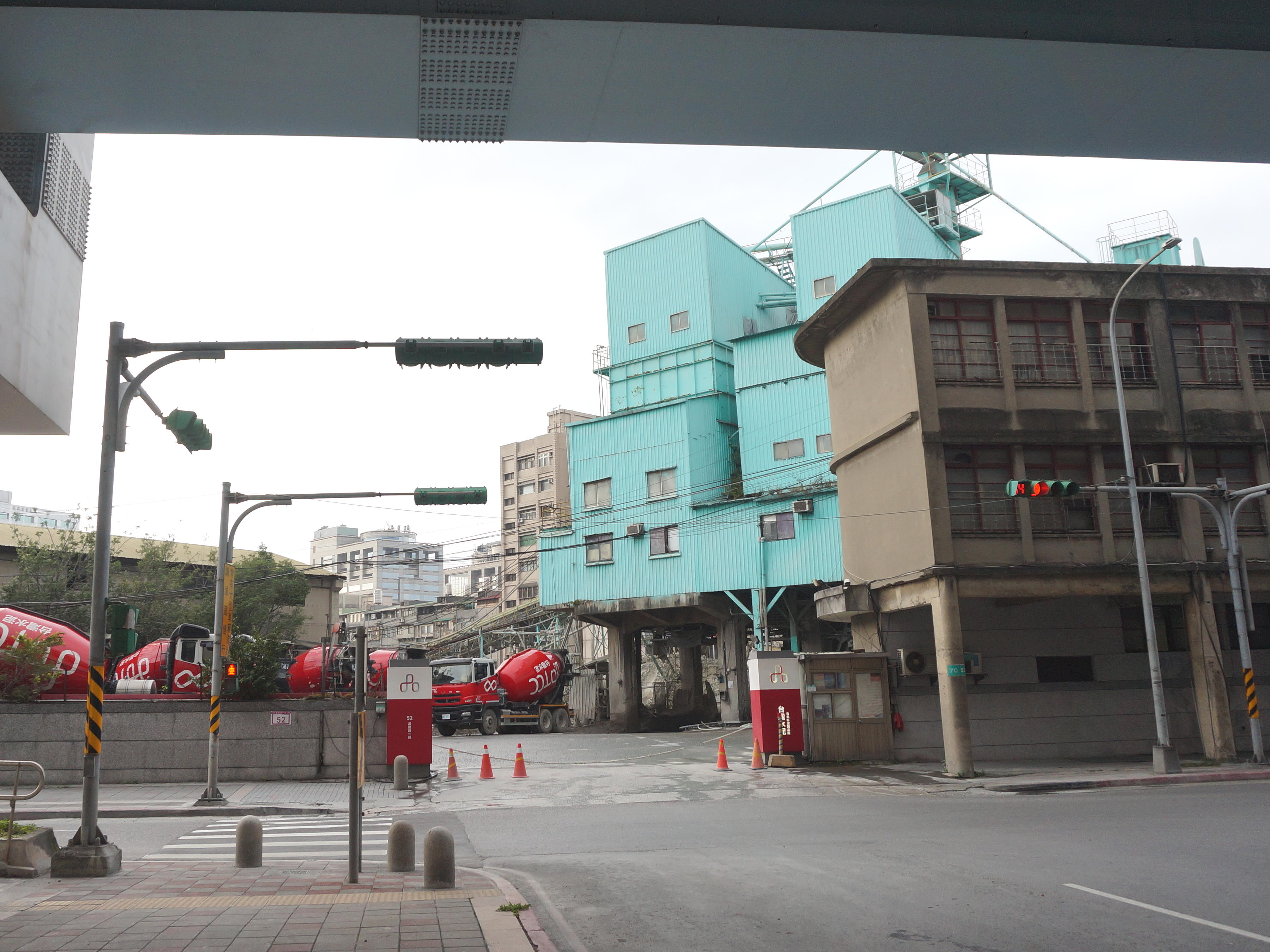 台灣水泥台北製品廠大門。